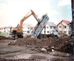 โรงเรียนสวนกุหลาบวิทยาลัย รังสิต แรกก่อตั้ง